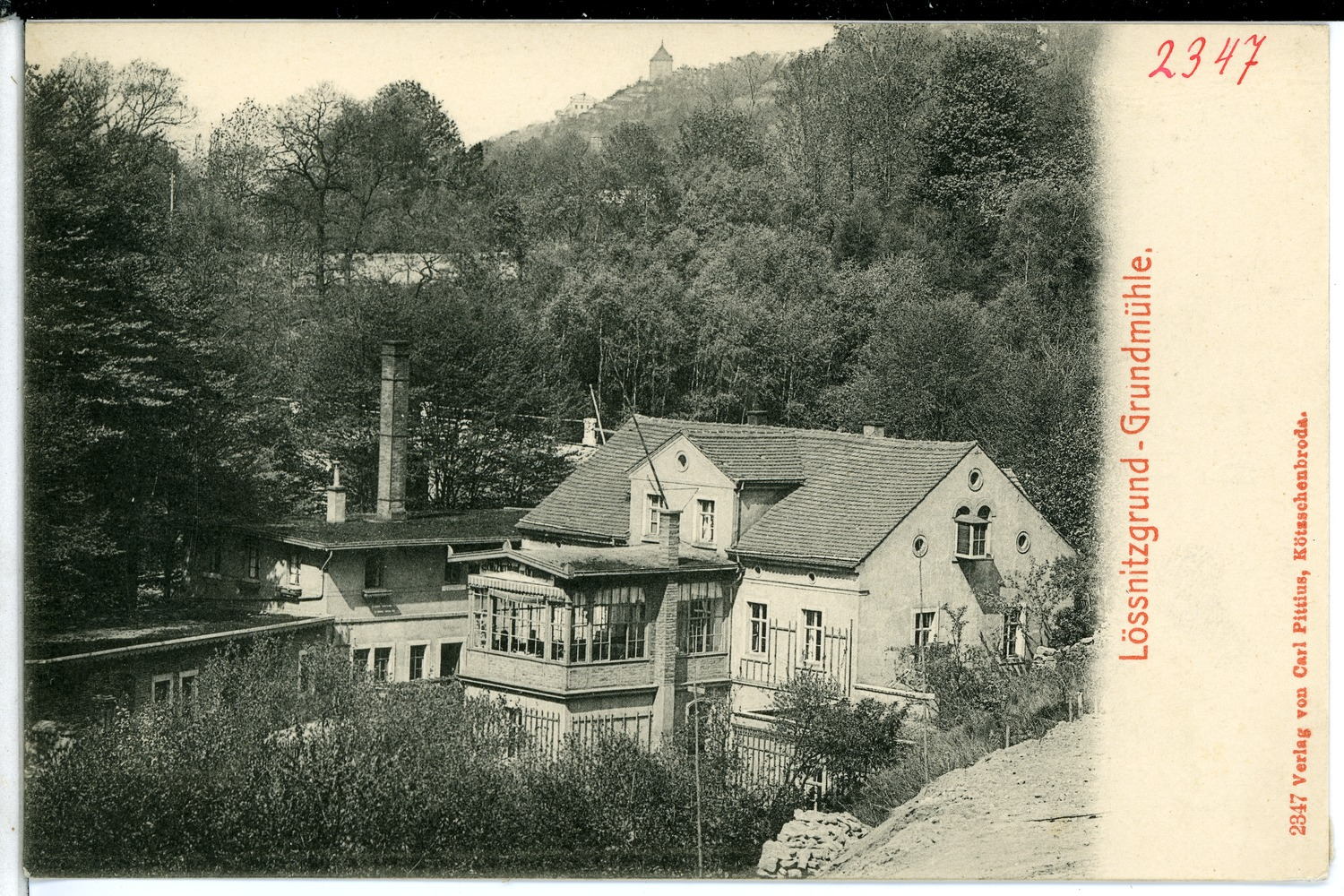 Lößnitzgrund; Grundmühle This postcard is from publisher Brück & Sohn in Meißen ( postcard has a unique number 02347 and is available in a higher resolution at the publisher. This images was uploaded in a cooperation project between Wikipedians and the publisher.